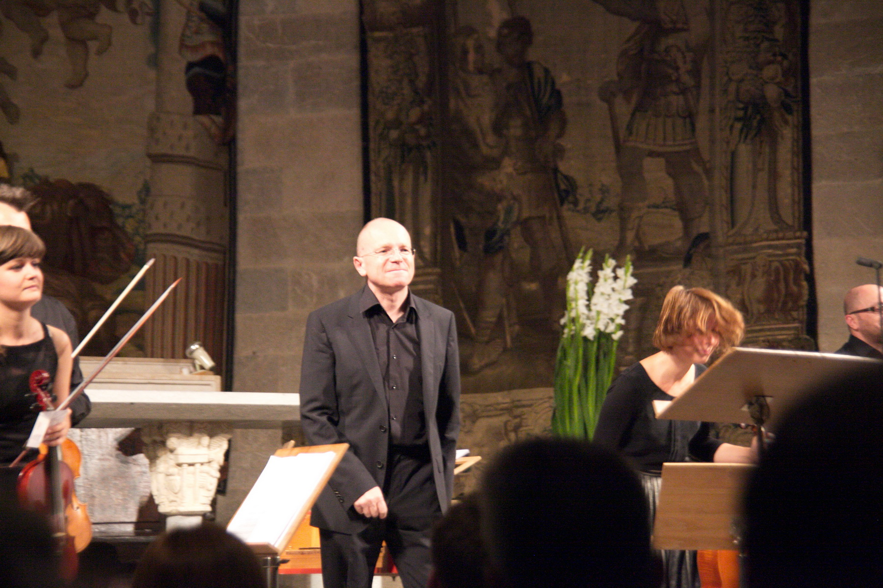 Jan Tomasz Adamus dirigint la capella cracoviensis durant un concert de Xavier Sabata al Festival de Peralada, 2016